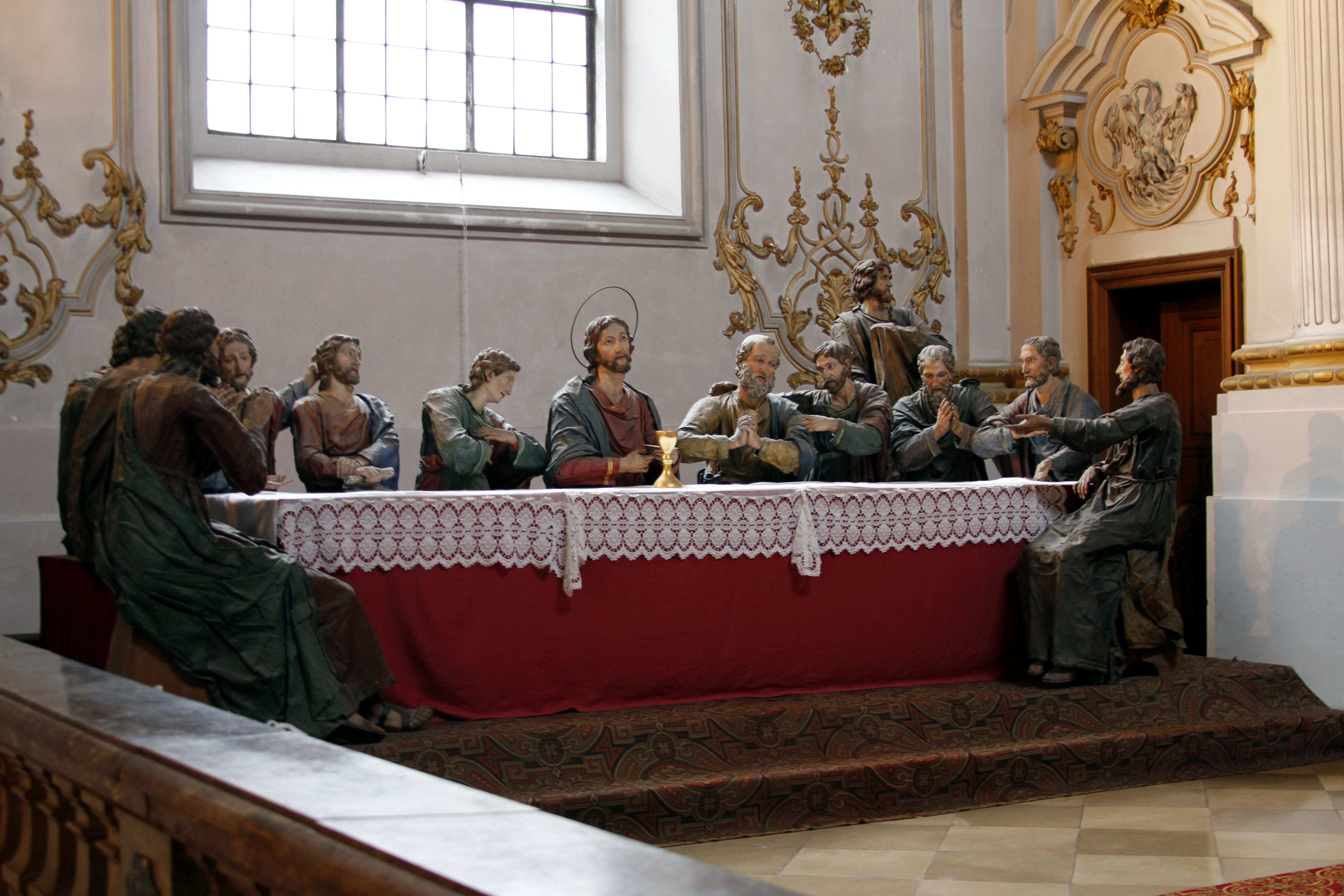 Damenstiftskirche Sankt Anna - Munich - Germany